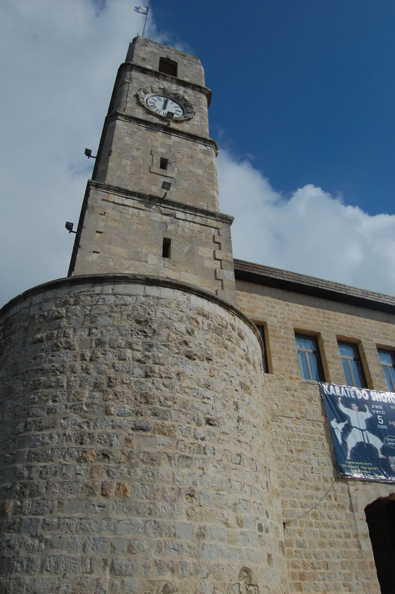 בניין הסראייה בצפת, בניין הממשל הטורקי ואח"כ הבריטי